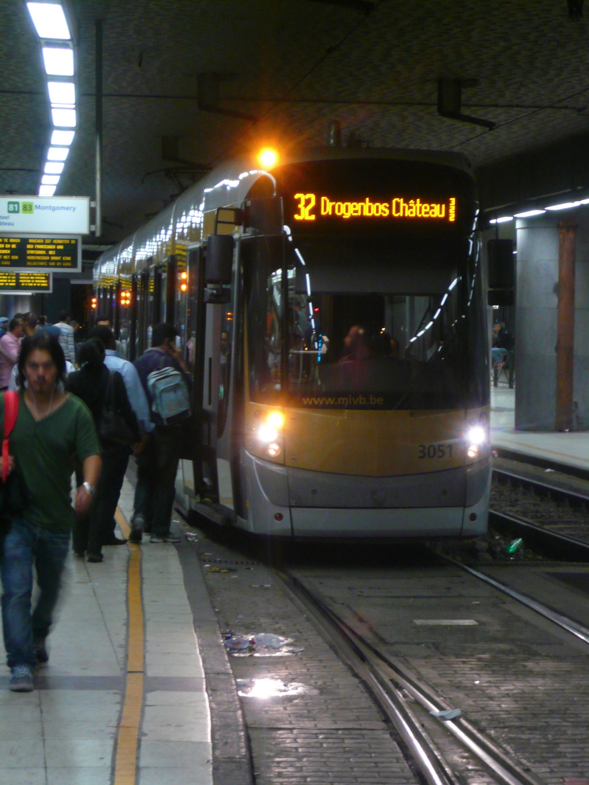 Tramway de Bruxelles - La motrice 3051 sur la ligne 32 à la Gare du Midi vers Drogenbos Château.